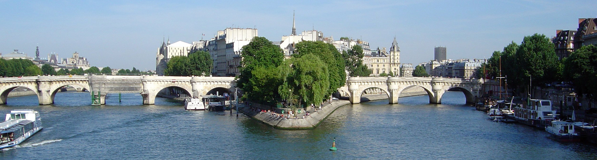 De Pont neuf ganz Source:Eege Foto vum David Monniaux aus de Commons